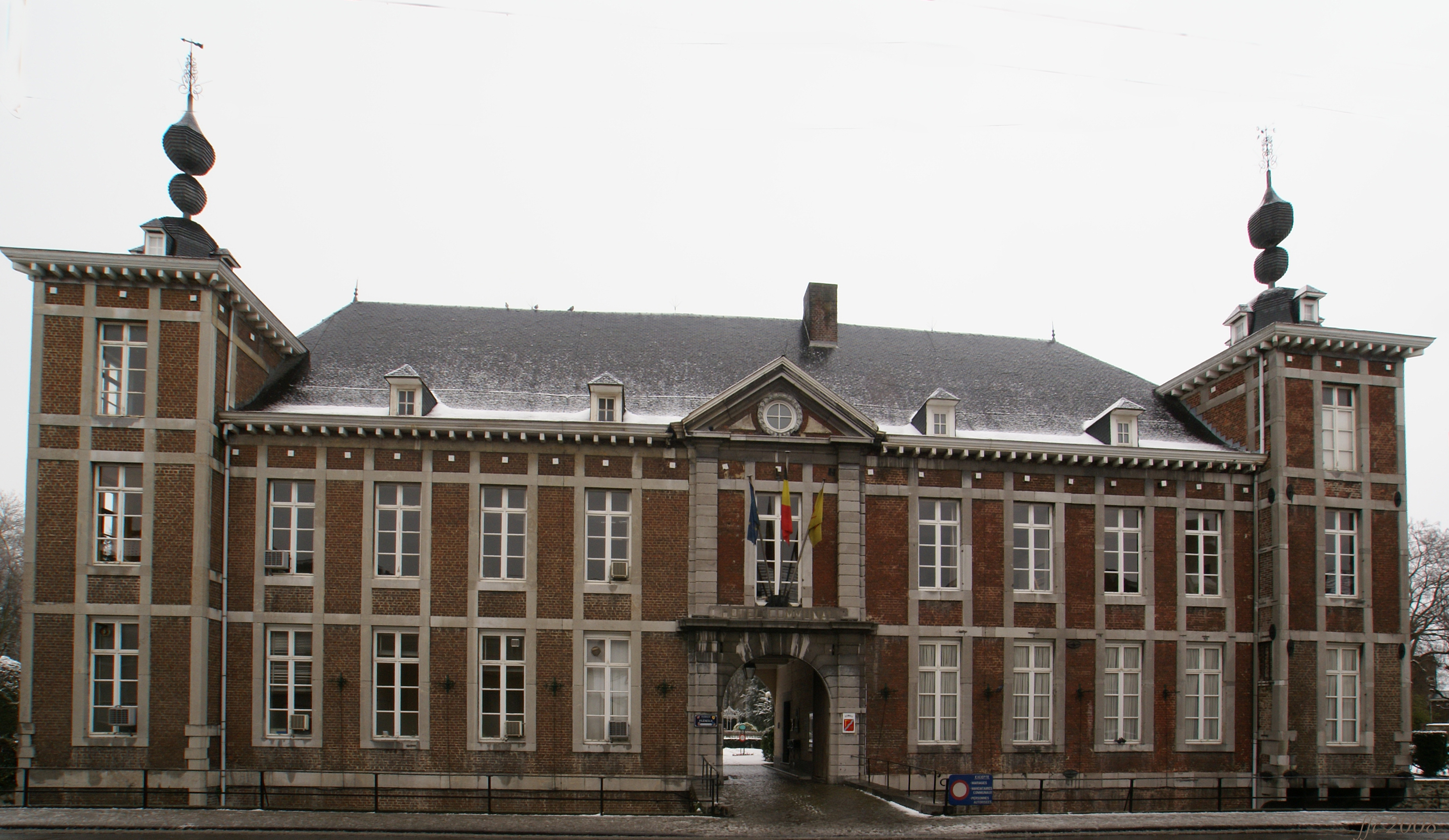 Flémalle (Petite Flemal) (Belgium) château de la Petite Flémal - Maison Communale Castell de “la petite Flemal” - Casa de la vila Castle: “La Petite Flemal” - Town Hall